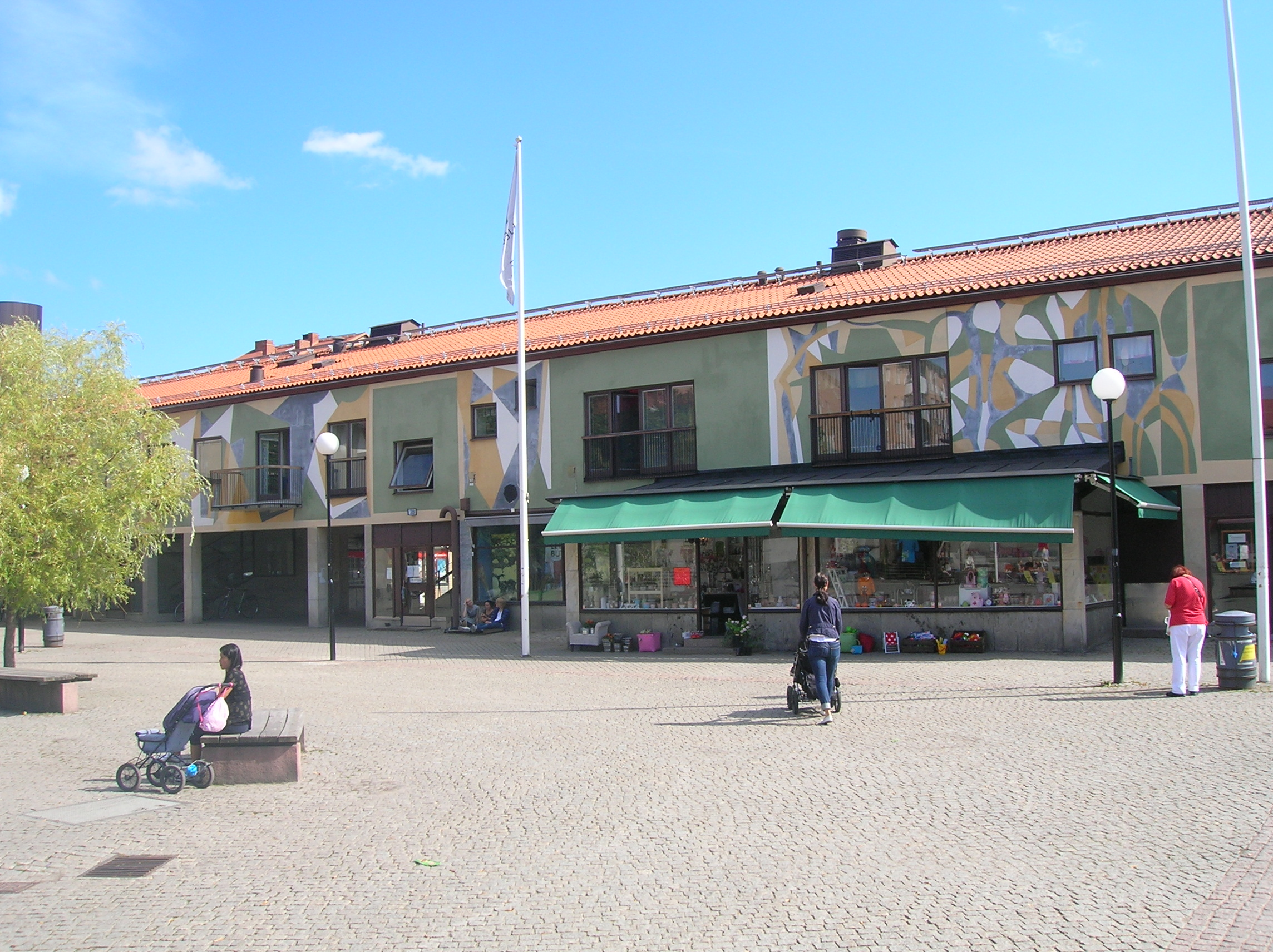 Vid Årsta torg, huslängan mot Hjälmarsvägen sedd från torget.